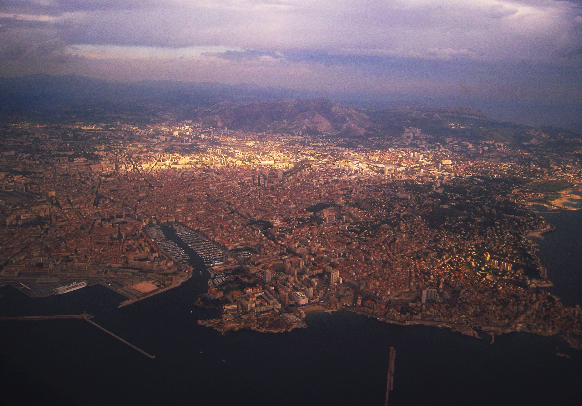 Vue de Marseille d'un ATR 72 de la CCM.